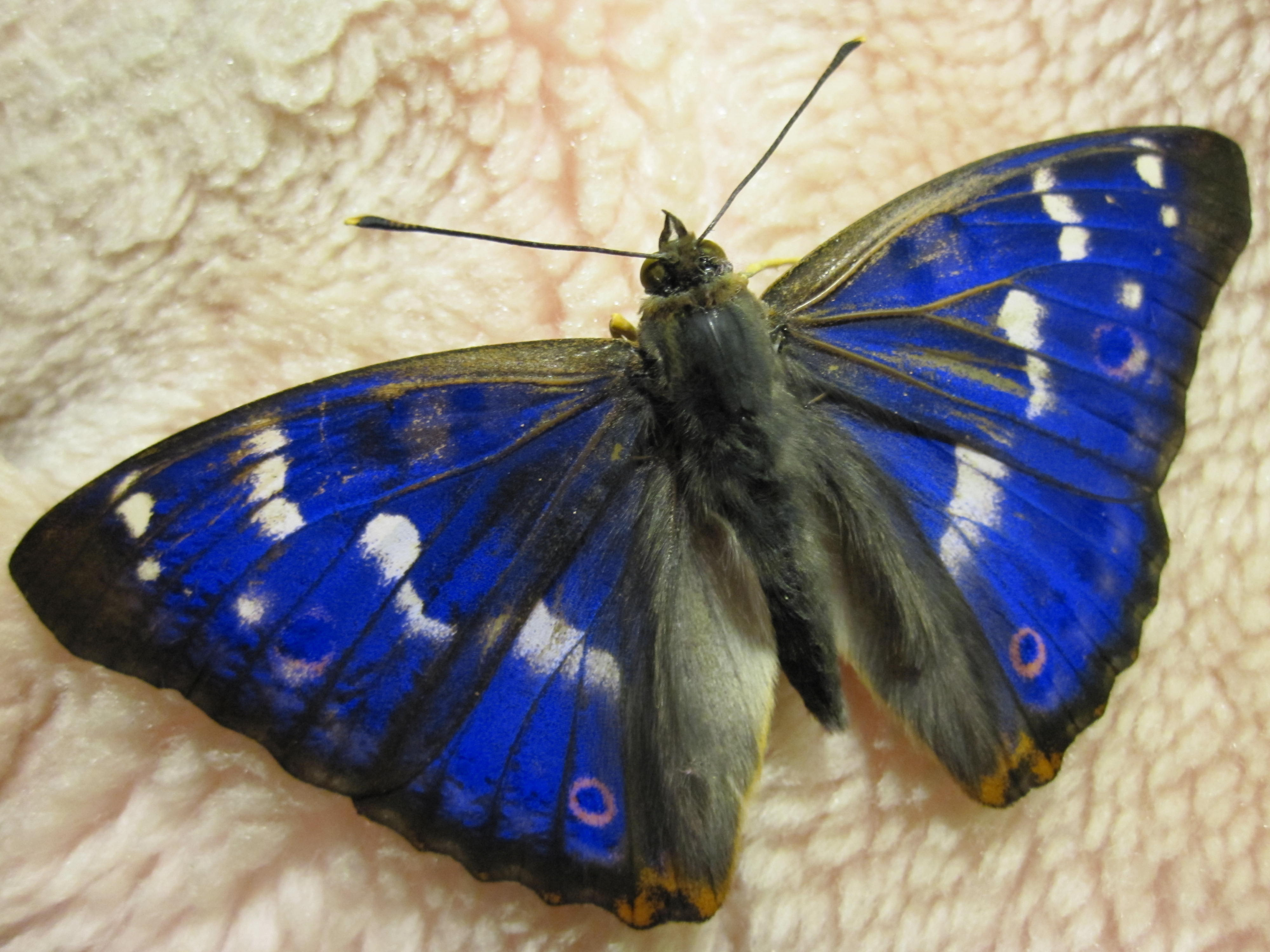 Pildistatud Perakülas Nõva vallas Läänemaal.